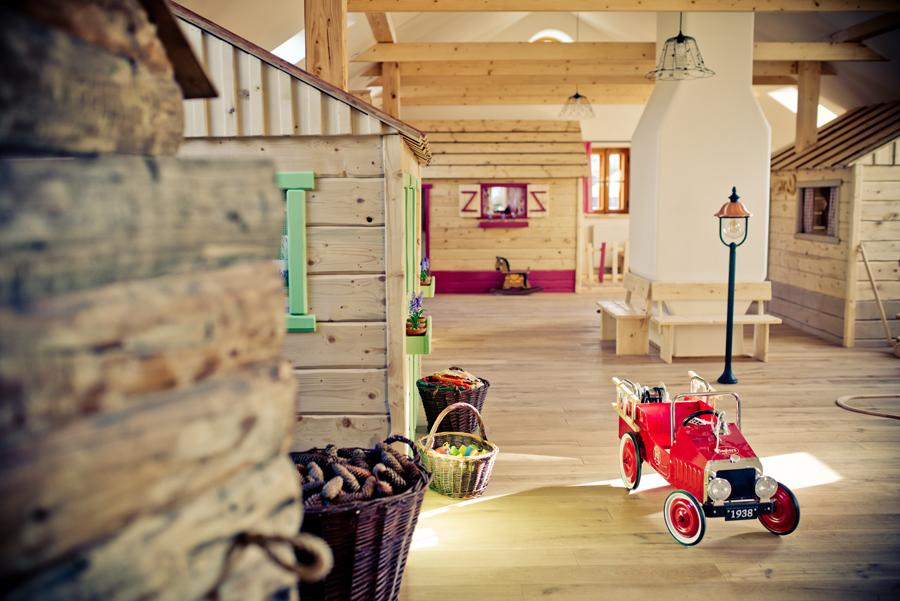 Pradědovo dětské muzeum je rájem pro děti